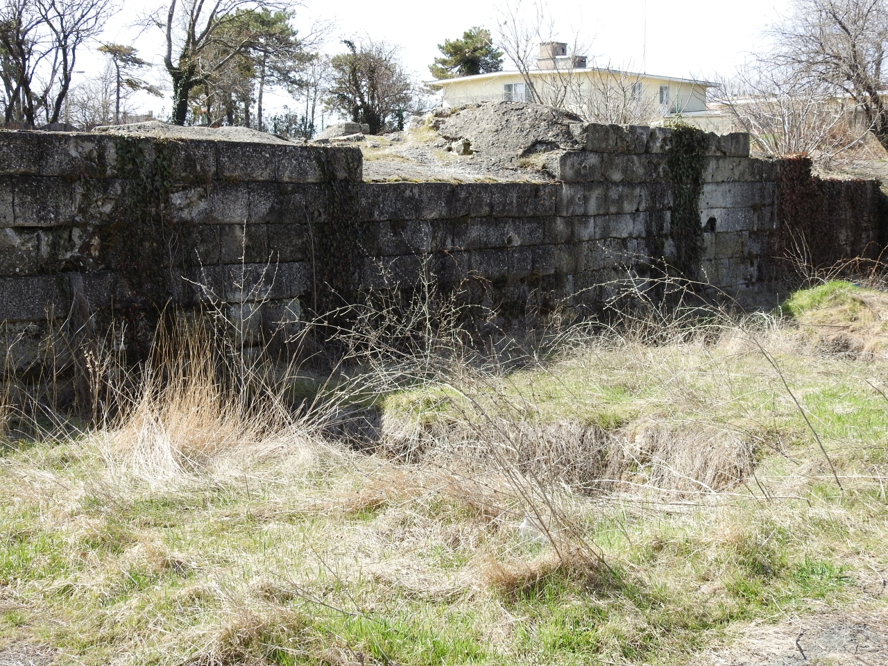 Zid de incintă 12